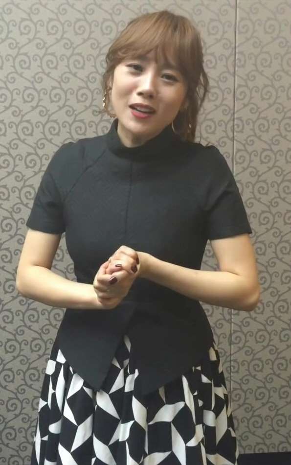 (싹튜브) 서울종합예술실용학교 SAC 날자 연예인 스타 축하메세지 1탄 - 이수영